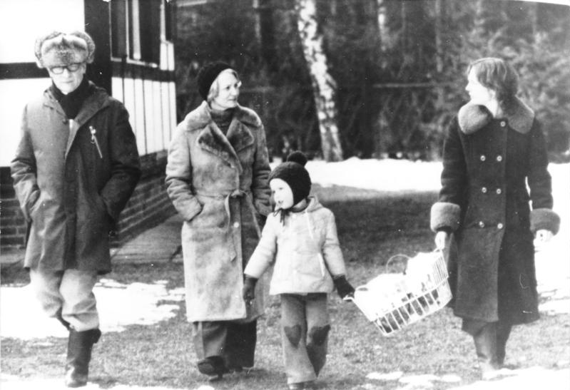 Familie Honecker beim Spaziergang im Winter ADN-ZB / Archiv / 10.9.80 Erich Honecker beim Spaziergang mit Frau Margot, Tochter Sonja und Enkelsohn Roberto (Aufn.: 1977) Abgebildete Personen: Honecker, Erich: Staatsratsvorsitzender, Generalsekretär des ZK der SED, DDR (GND 118553399) Honecker, Margot: Ministerin für Volksbildung, SED, DDR (GND 122782933)